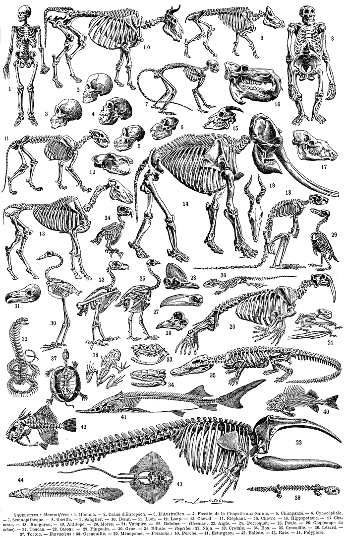 Aspect de différents squelettes, scannée depuis le Larousse 1922 par Nataraja-Shiva.